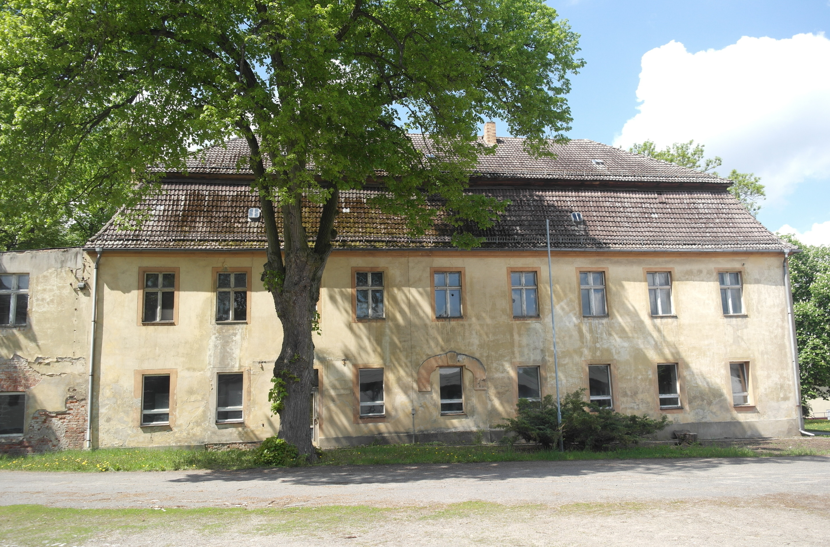 Gutshaus in Kemlitz, Stadt Dahme, denkmalgeschützt